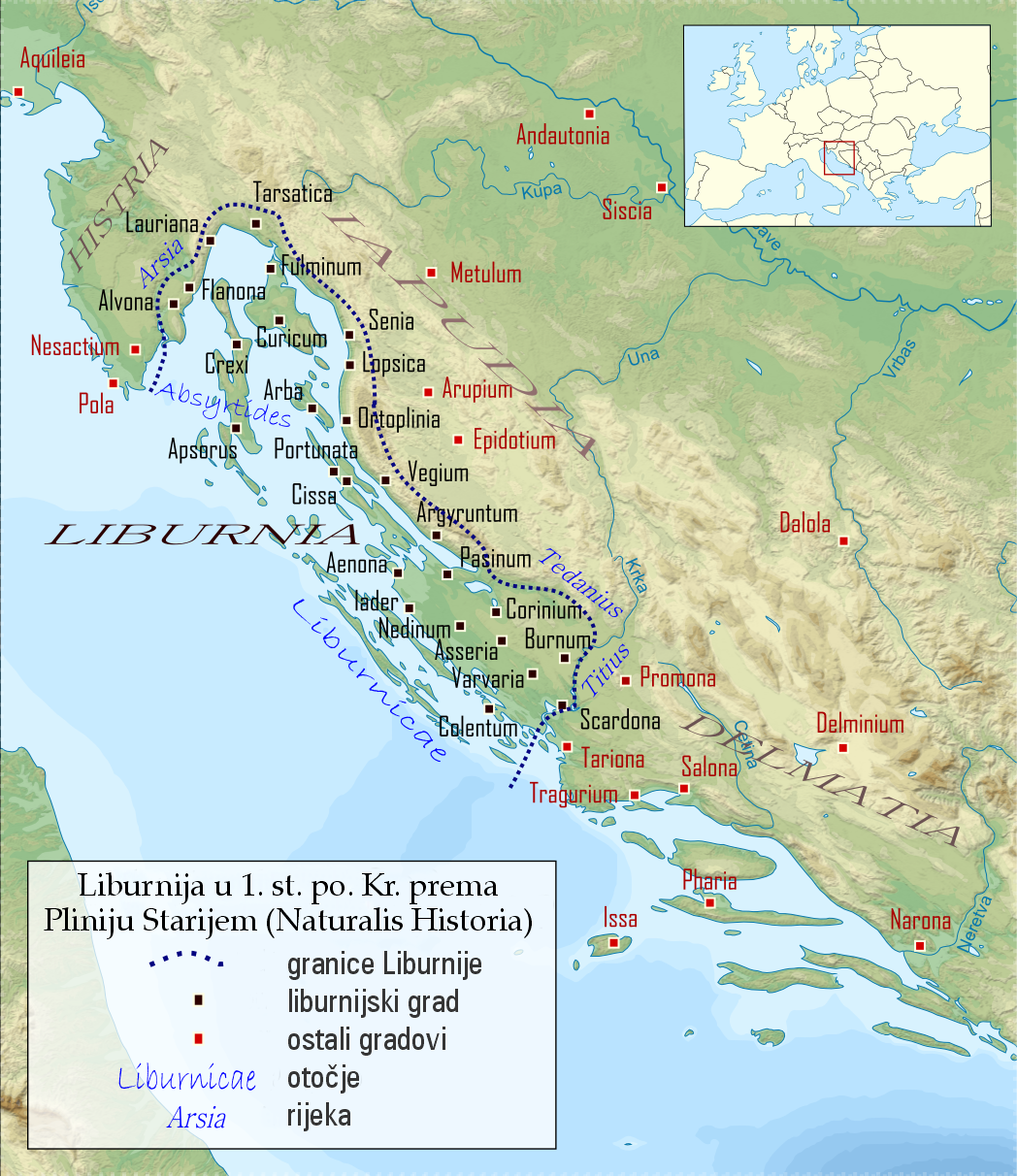 Granice Liburnije prema Pliniju Starijem (S. Čače, Broj liburnskih općina i vjerodostojnost Plinija (Nat. hist. 3, 130; 139.-141.), Radovi Filozofskog fakulteta u Zadru, 32, Zadar 1993., str. 1.-3.)